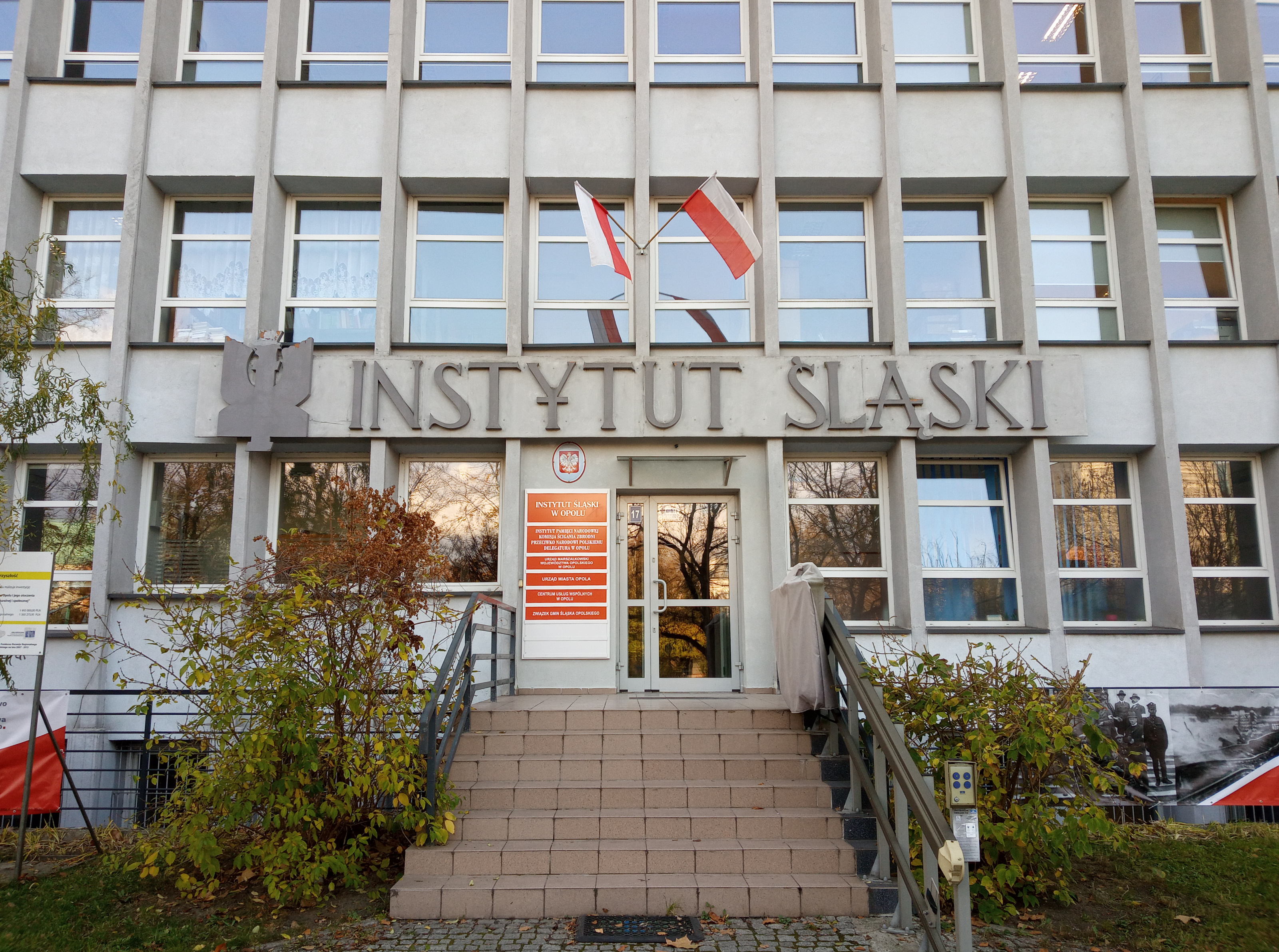 Fasada siedziby Instytutu Śląskiego Autor: Elżbieta Flisak